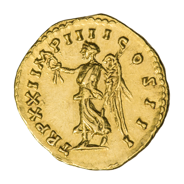 Марк Аврелий (161—180). Ауреус. Ок. 166—167 гг. Рим. Реверс. Надпись TR P XXI IMP IIII COS III. Виктория идет, влево; в руках венок и пальмовая ветвь.